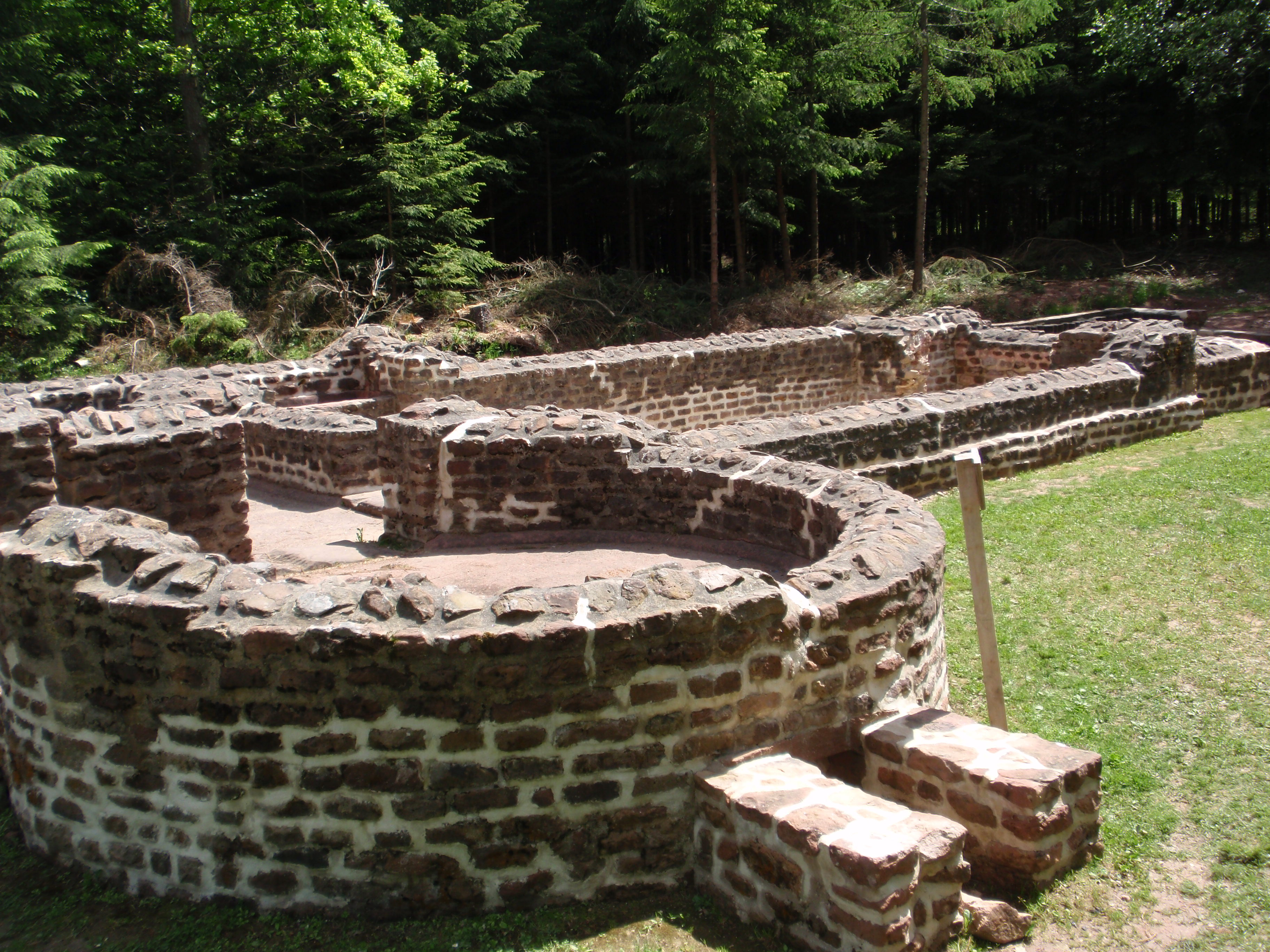 Ruinen einer römischen Badeanlage im Kastell Würzberg (Michelstadt, Deutschland)